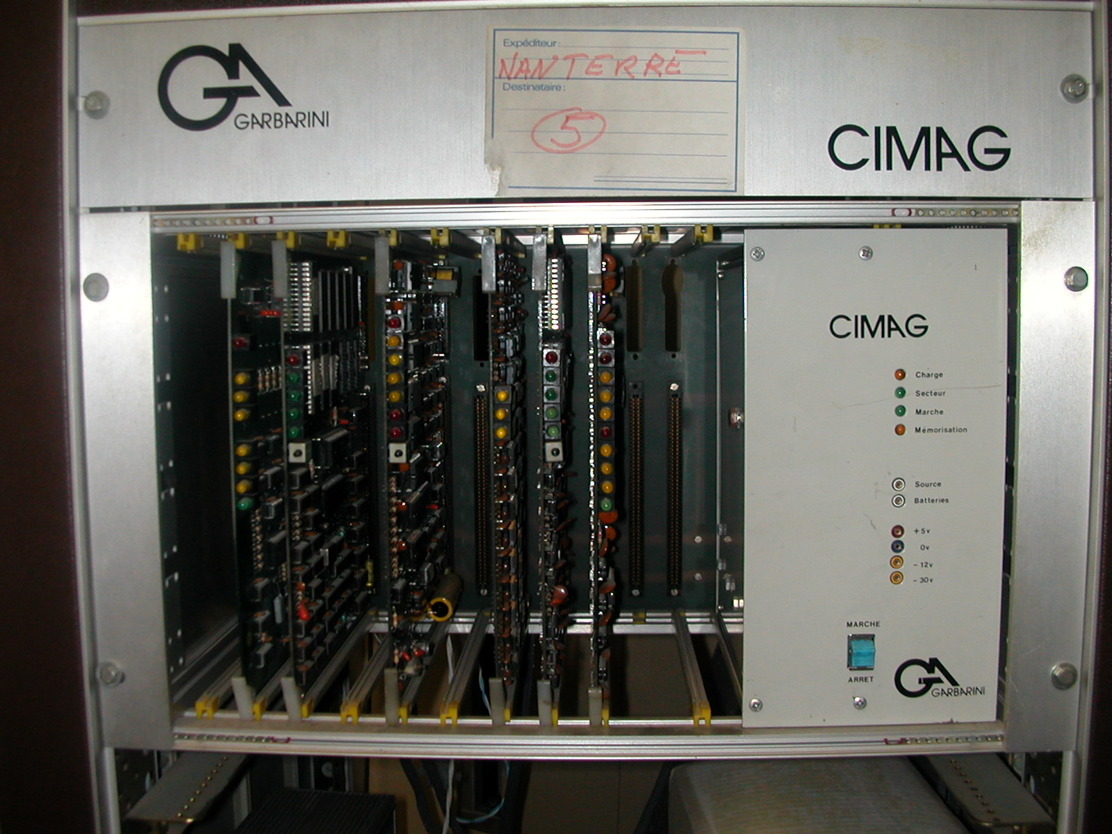 CIMAG pilotant les différentes STC